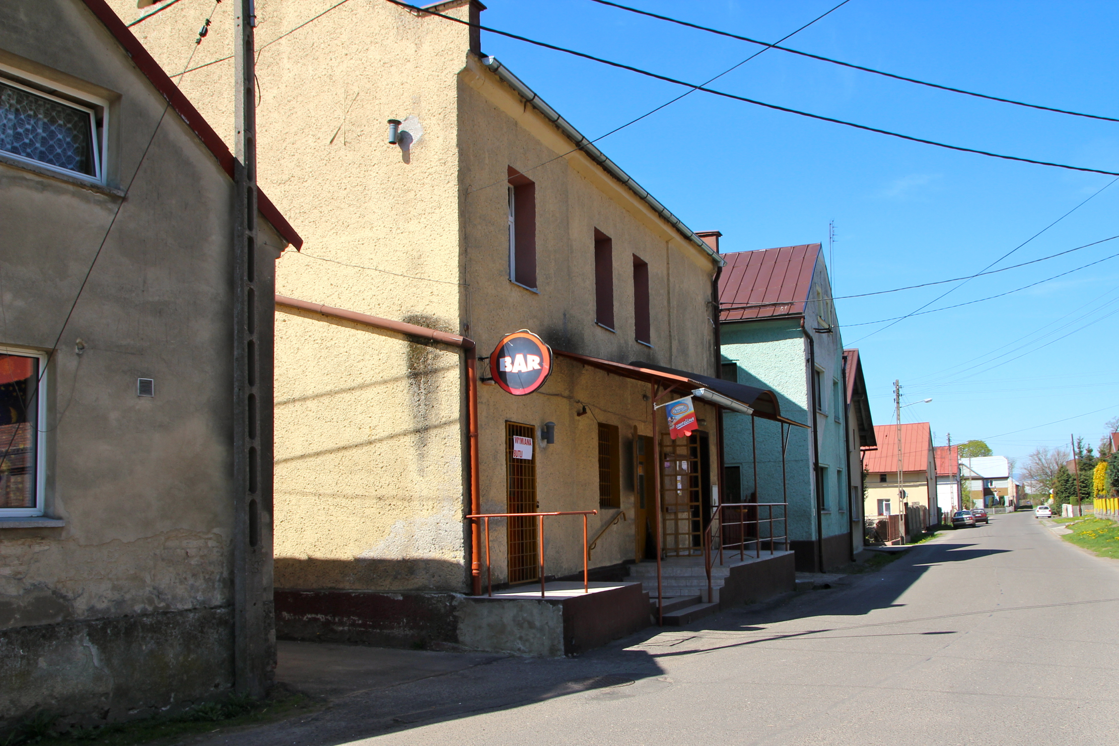 Gadzowice - wieś w Polsce położona w województwie opolskim, w powiecie głubczyckim, w gminie Głubczyce.